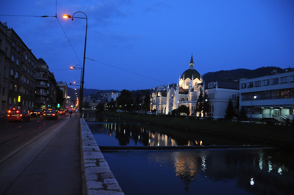 Miljacka River